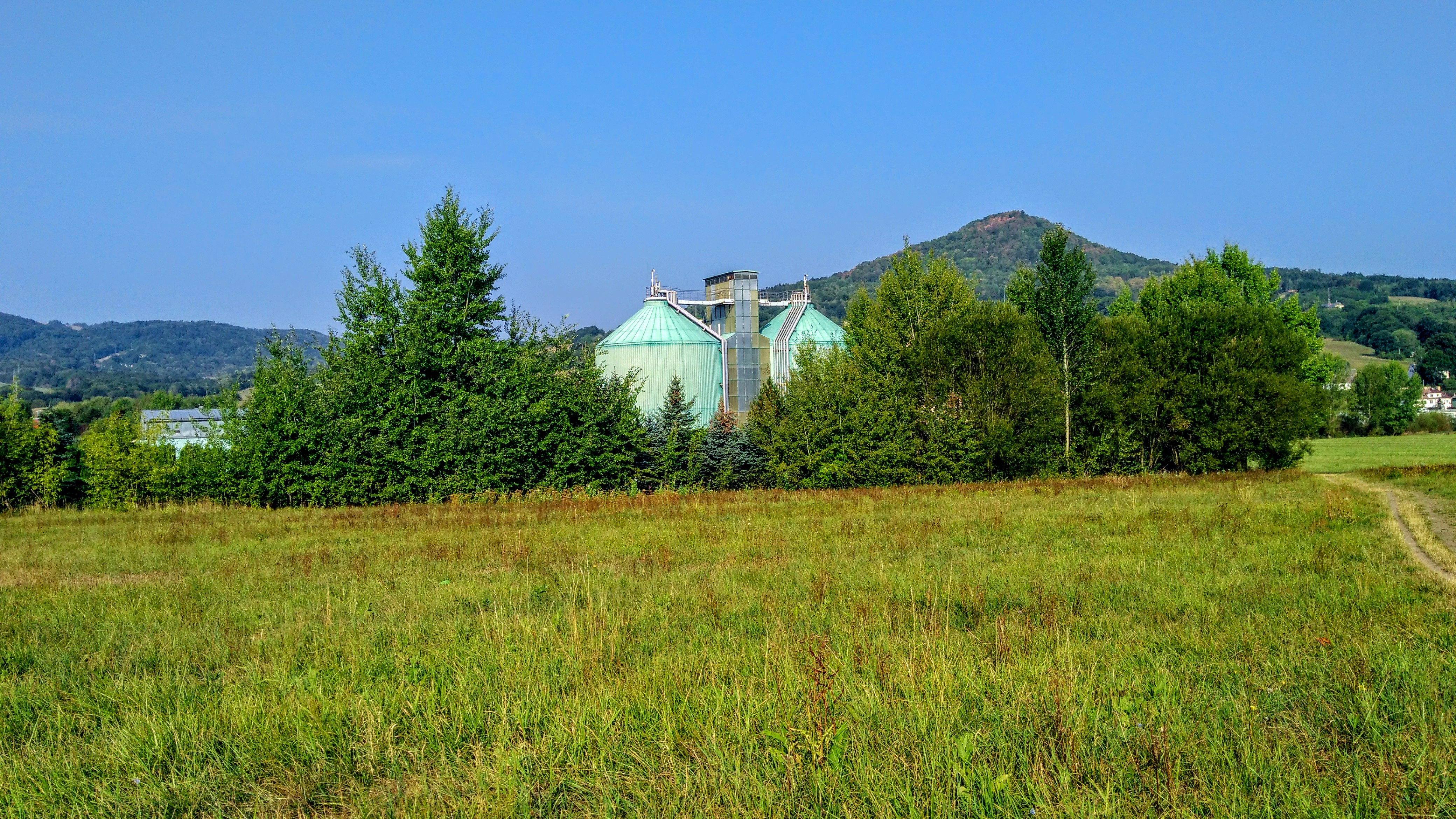 Čistička.